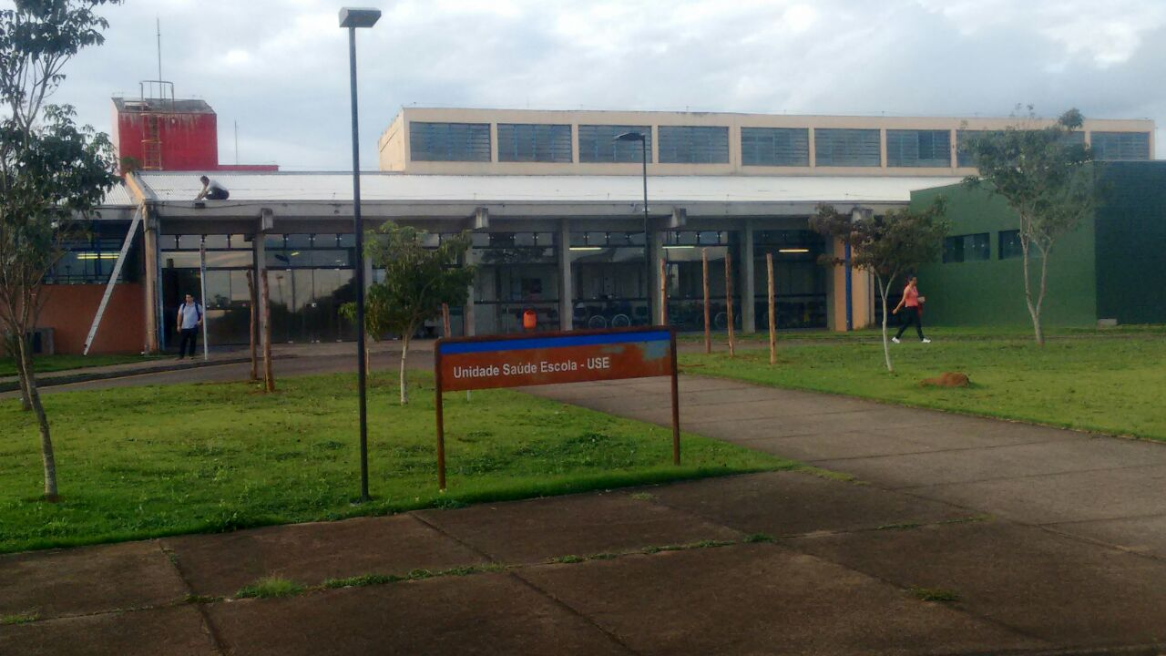 Unidade Saude-Escola